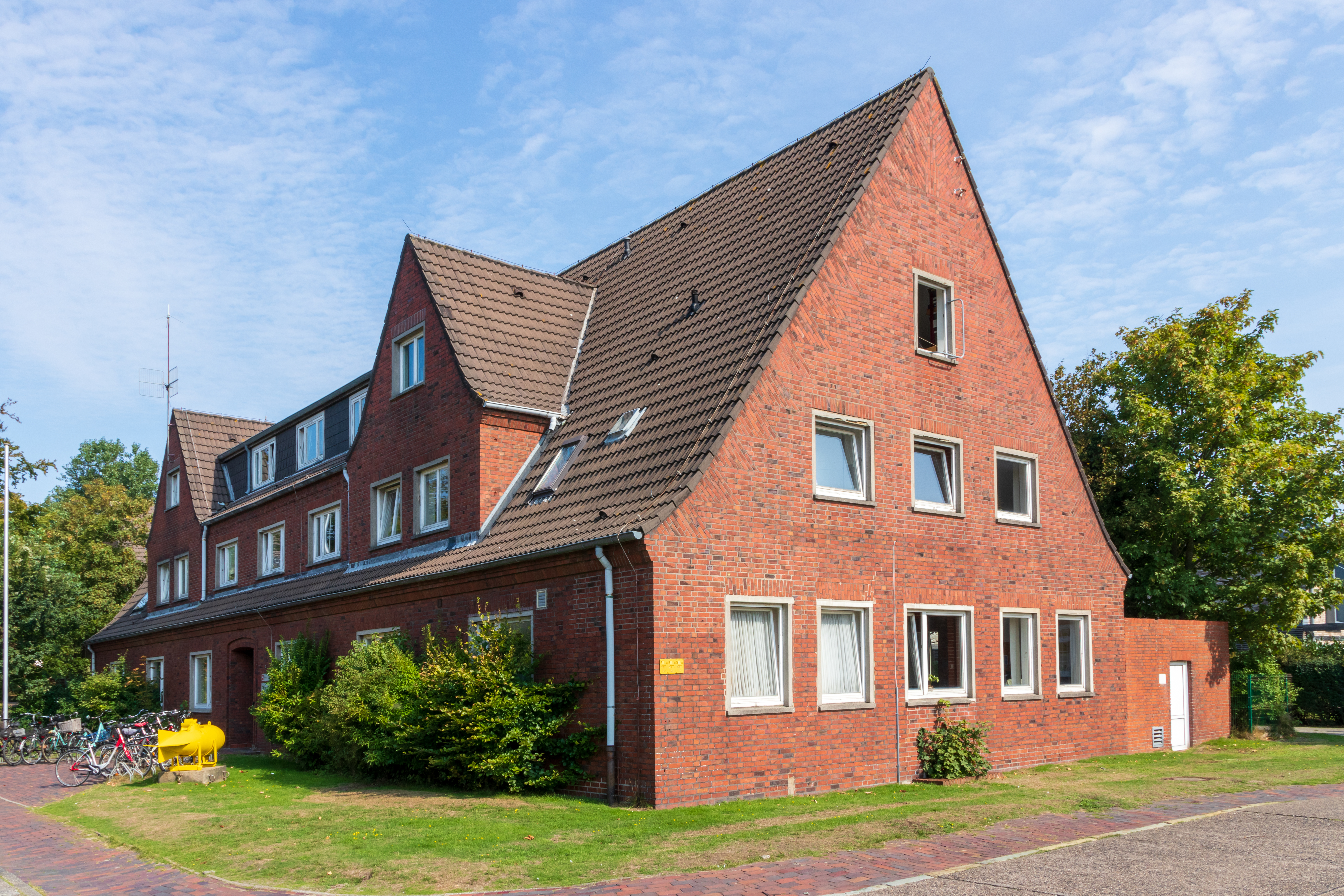 Bürogebäude der Forschungsstelle Küste auf Norderney